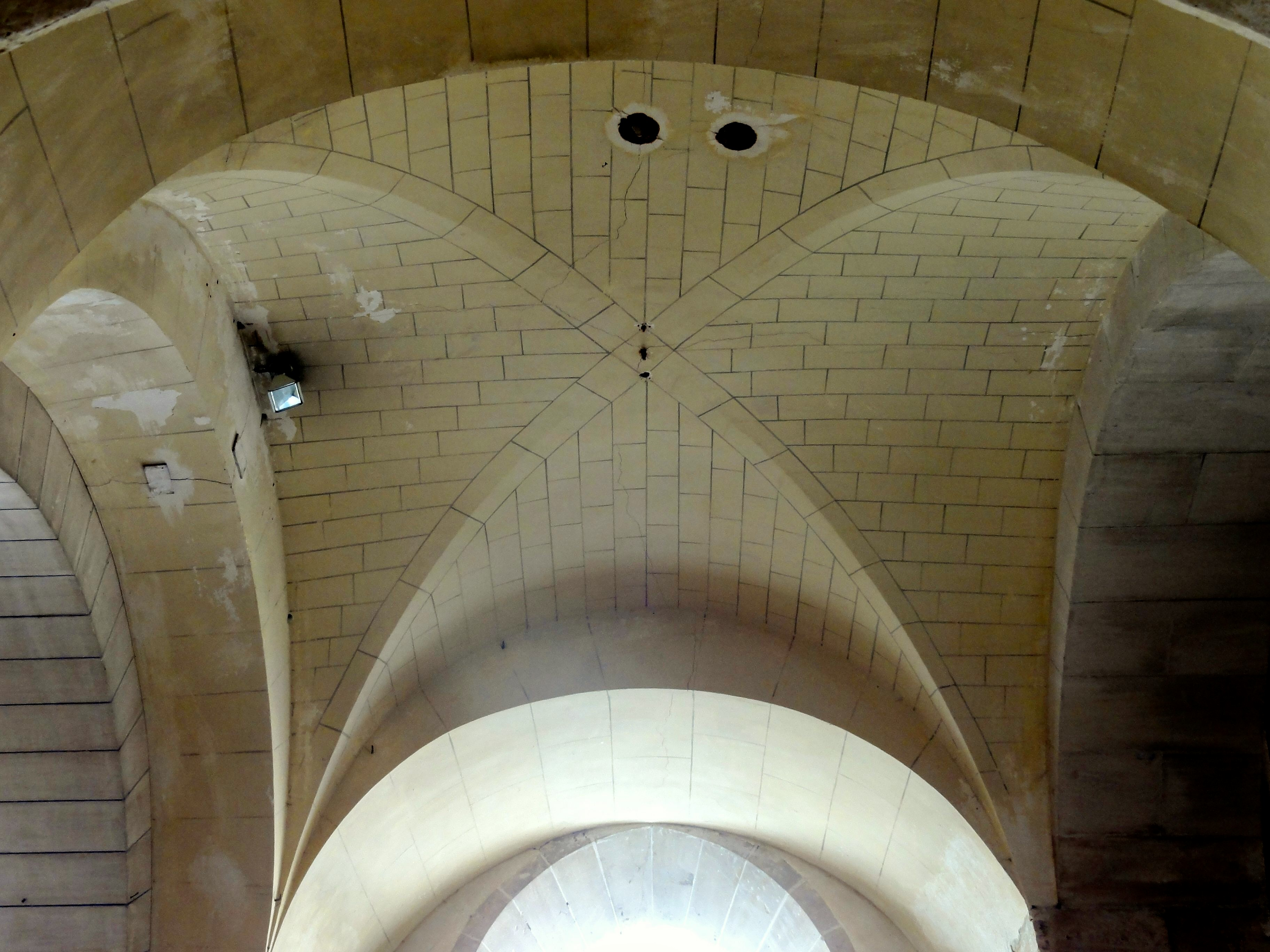 Voûte de l'ancienne croisée du transept (dont les croisillons n'existent plus).